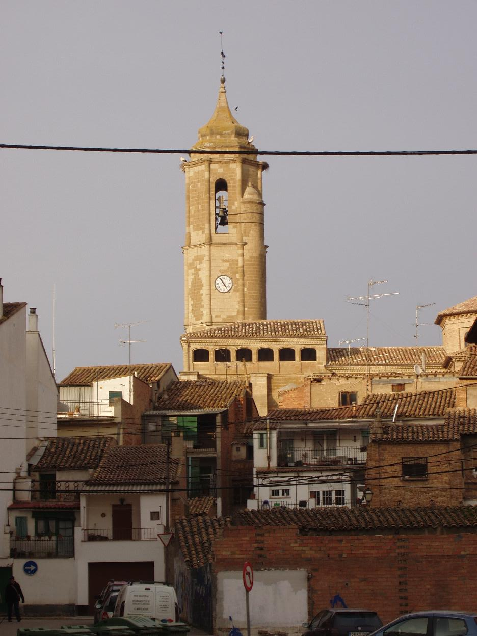 Torre de la iglesia y casas en Binéfar (Huesca, España)